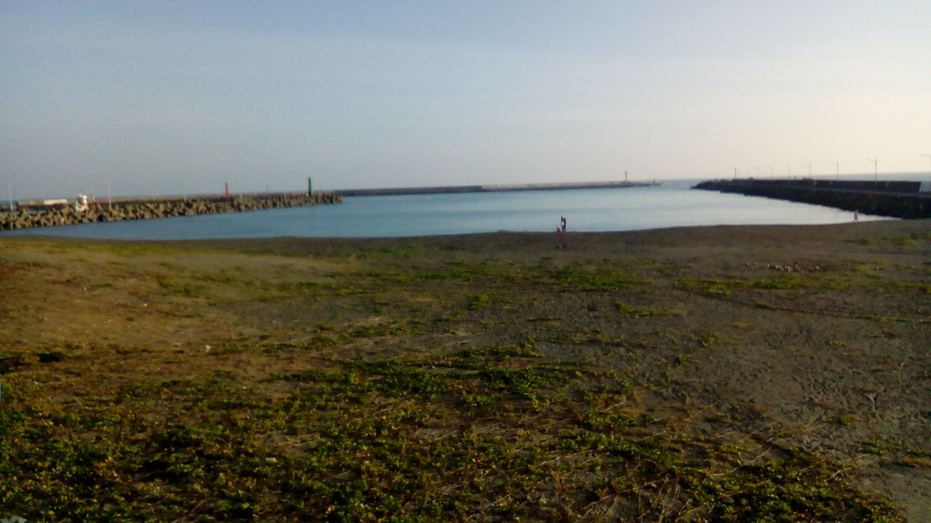 林園境內少數可戲水的沙灘 位於中芸漁港旁 鳳芸宮前